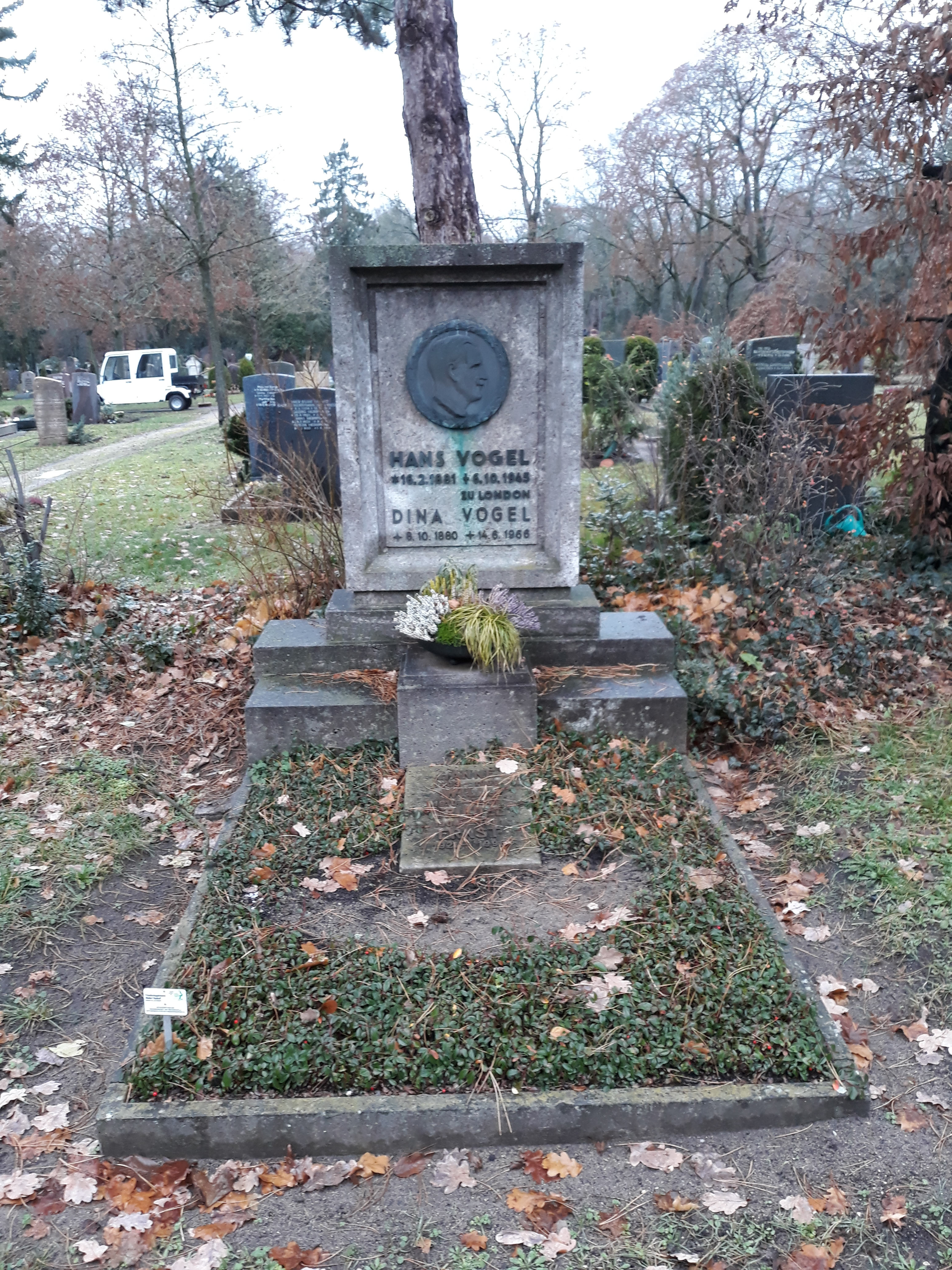 Das Grab des deutschen Politikers (SPD) Hans Vogel und seiner Ehefrau auf dem Westfriedhof Nürnberg.